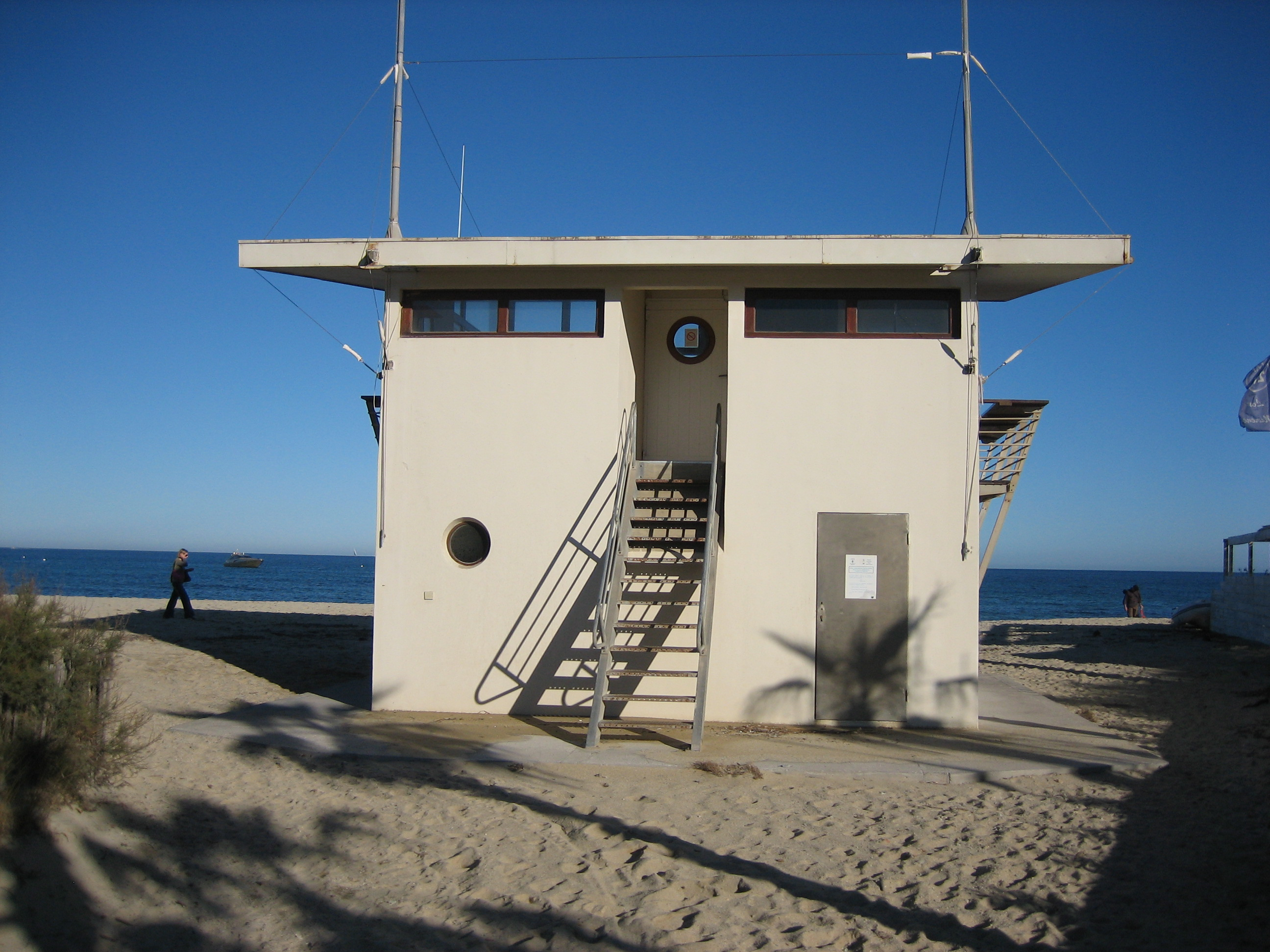 Plage de Pampelonne, Beach of Pampelonne